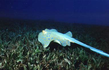 Taeniura lymma Blaupunktstachelrochen in der Naama Bay